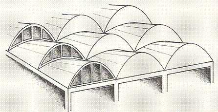 Pouziti konoidu jako stavebni plochy